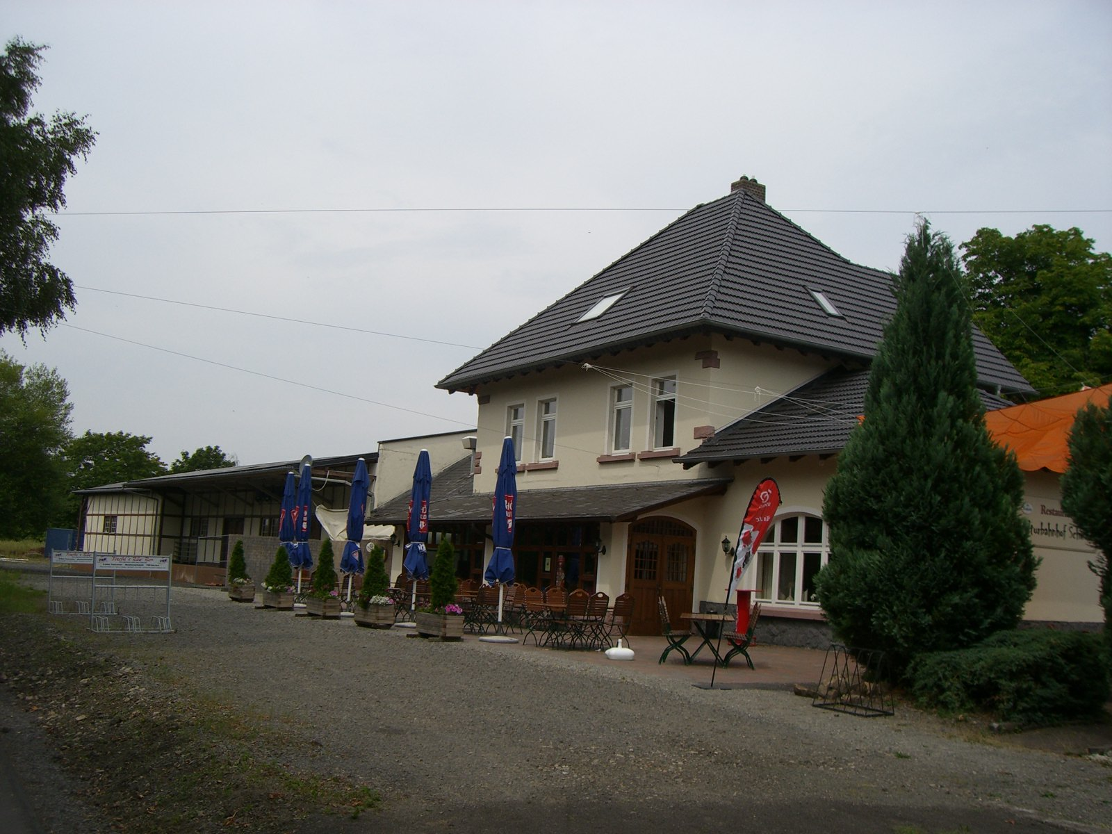 Bahnhof Ziegenhain, Hessen, Bahnradweg Rotkäppchenland